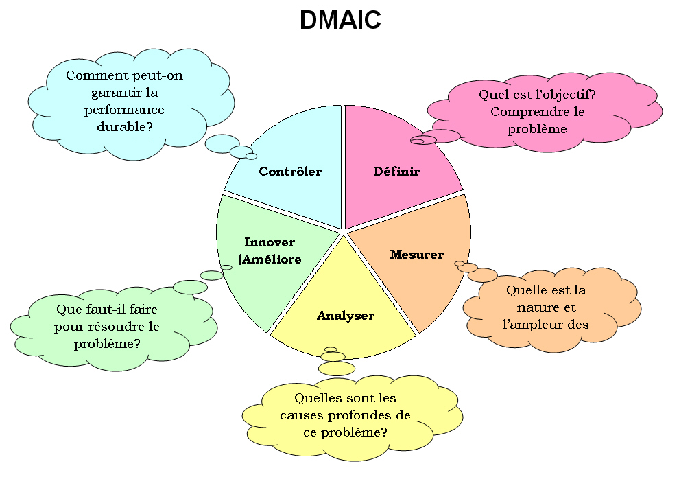 roue de la méthodes DMAIC